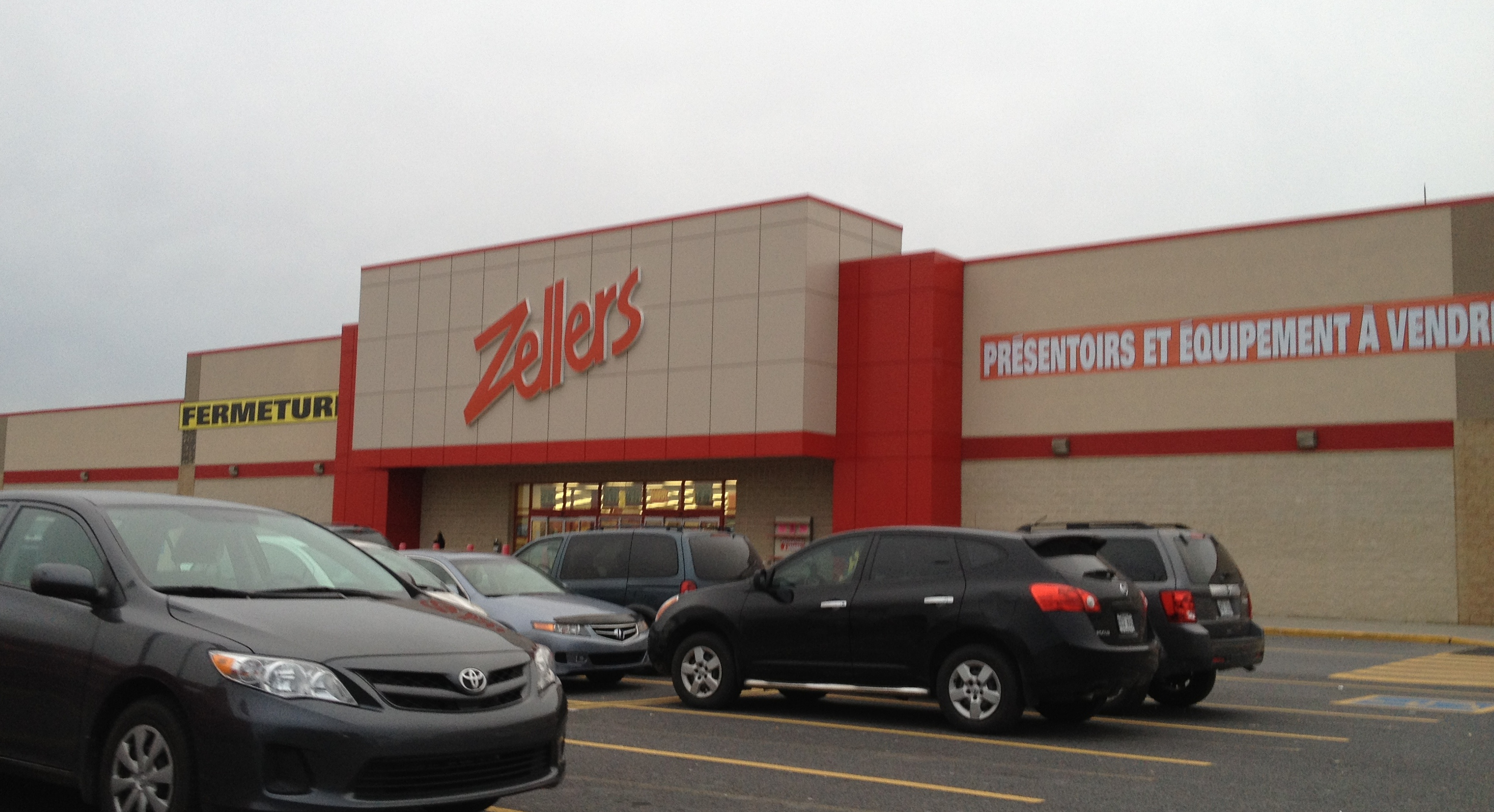 Zellers Brossard, QC 2